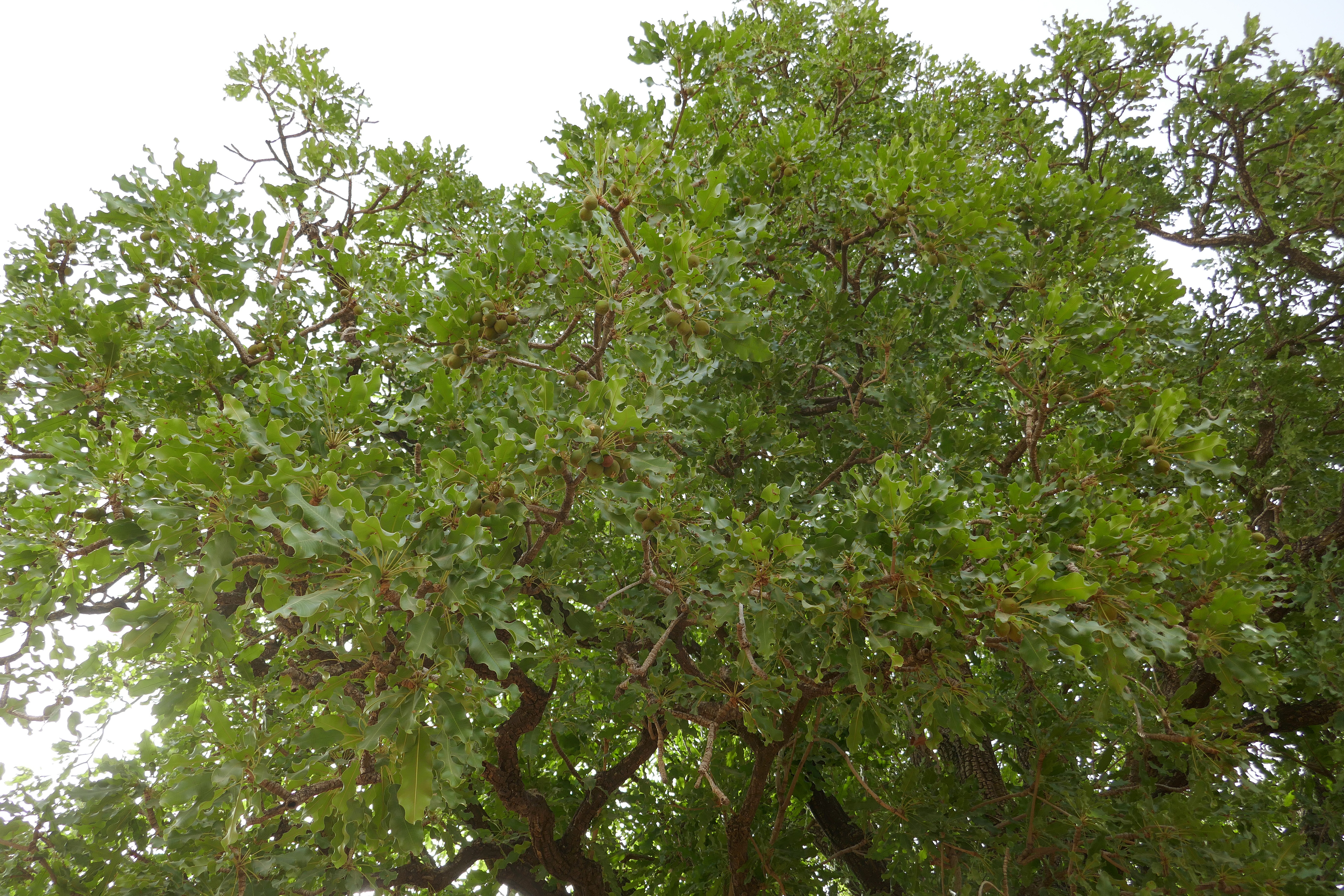 Arbre à karité en pays otammari dans le nord-ouest du Bénin.